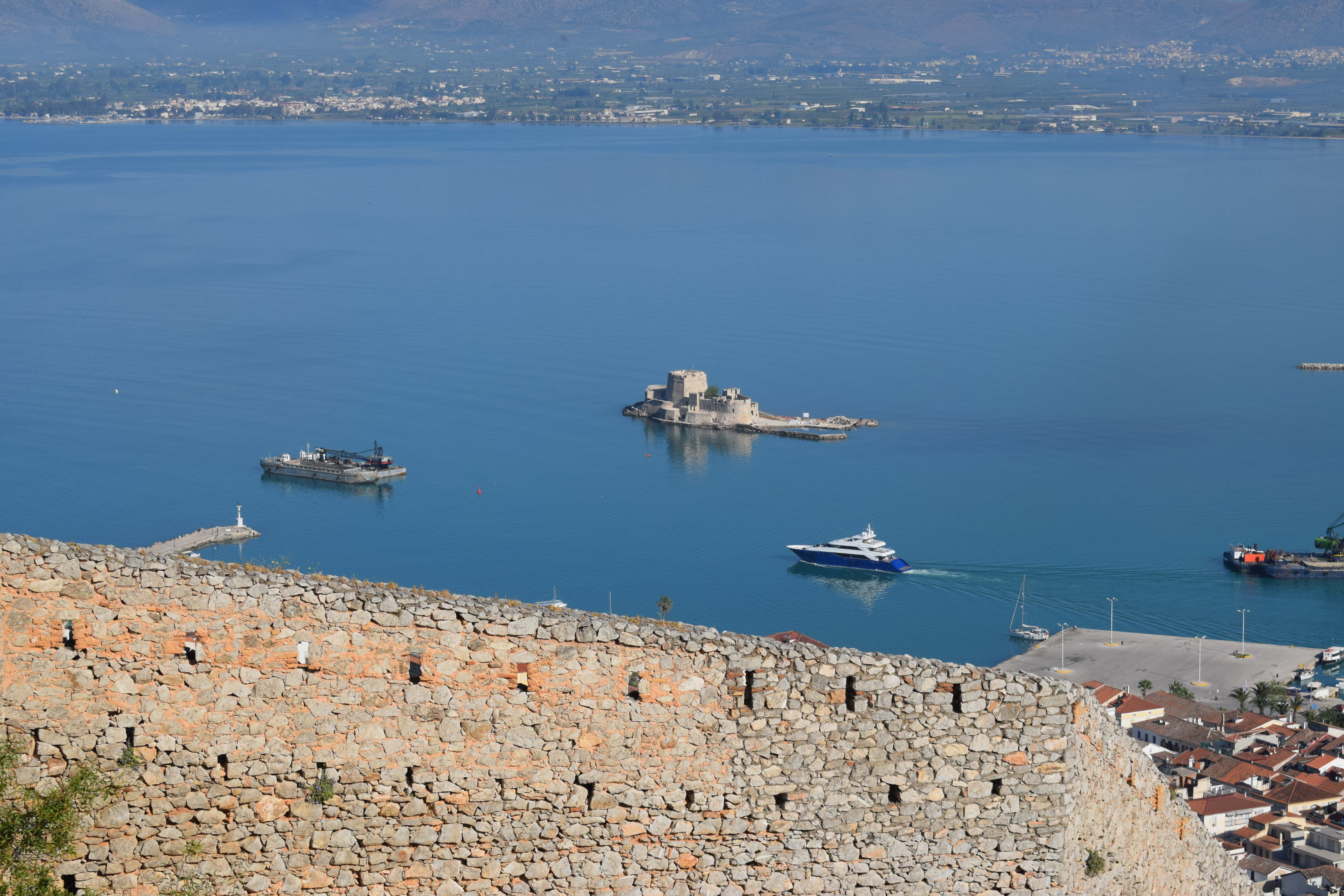 Vue de la forteresse Palamidi, surplombant Nauplie en Argolide (Péloponnèse, Grèce).